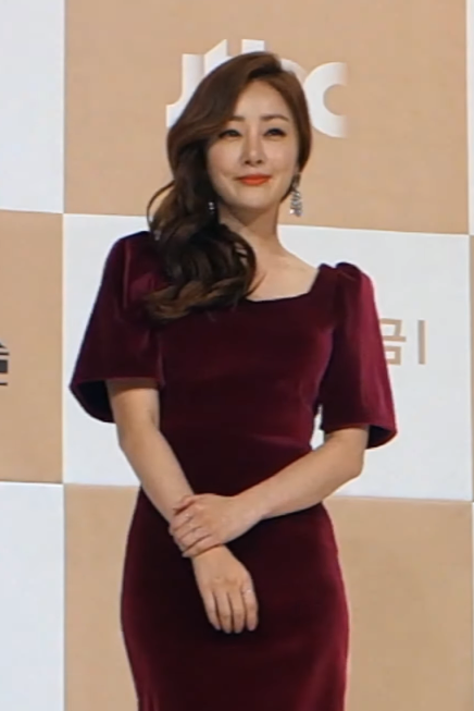 181122 JTBC 'SKY캐슬' 제작발표회